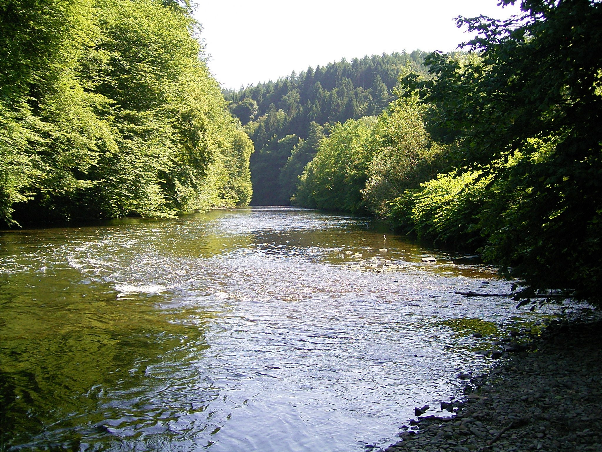 Wupper bei Wupperbrücke Wiesenkotten